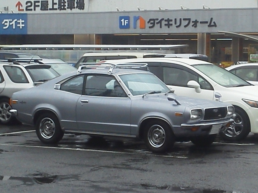 マツダ・グランドファミリア